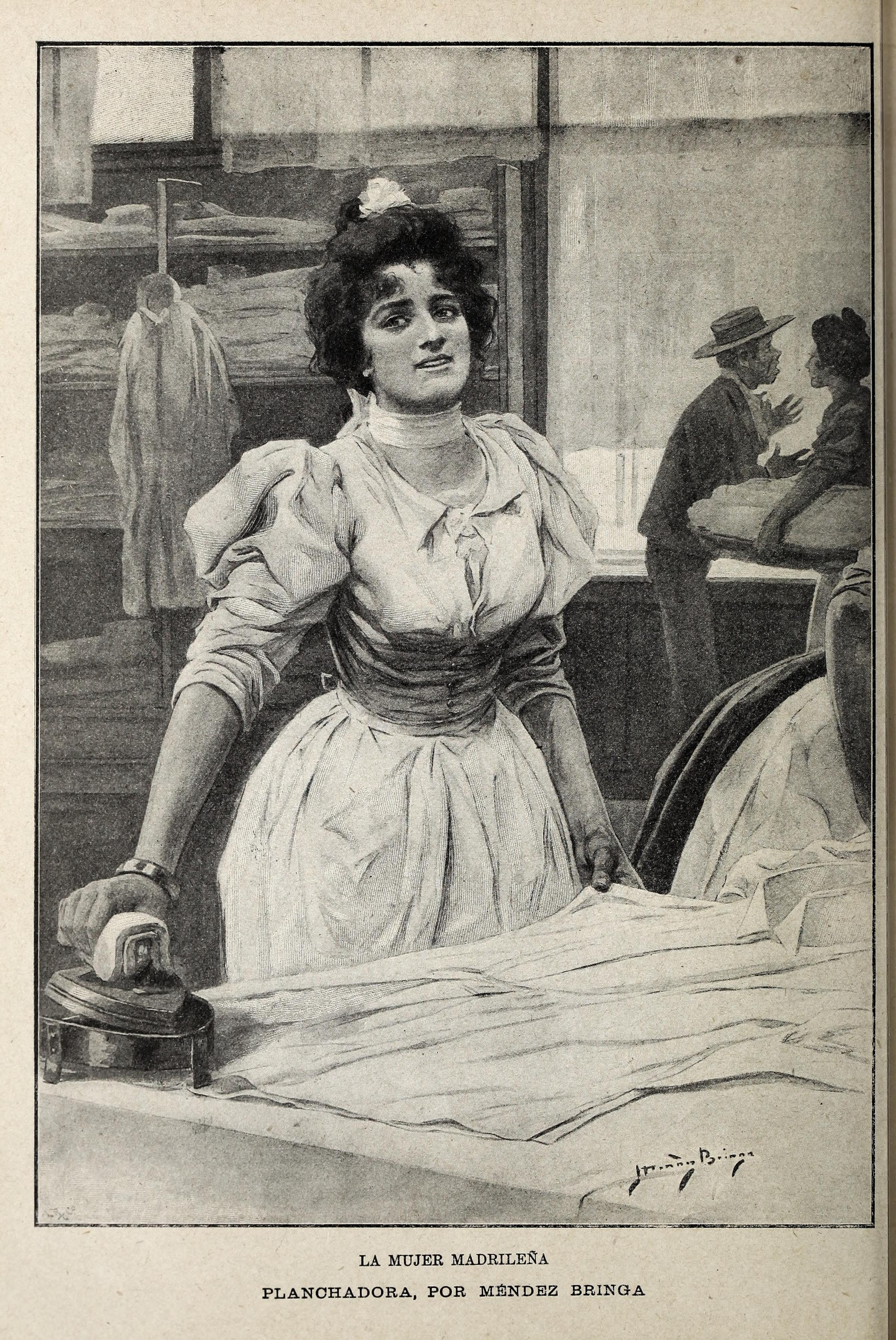 La Mujer Madrileña. Planchadora, de Méndez Bringa.